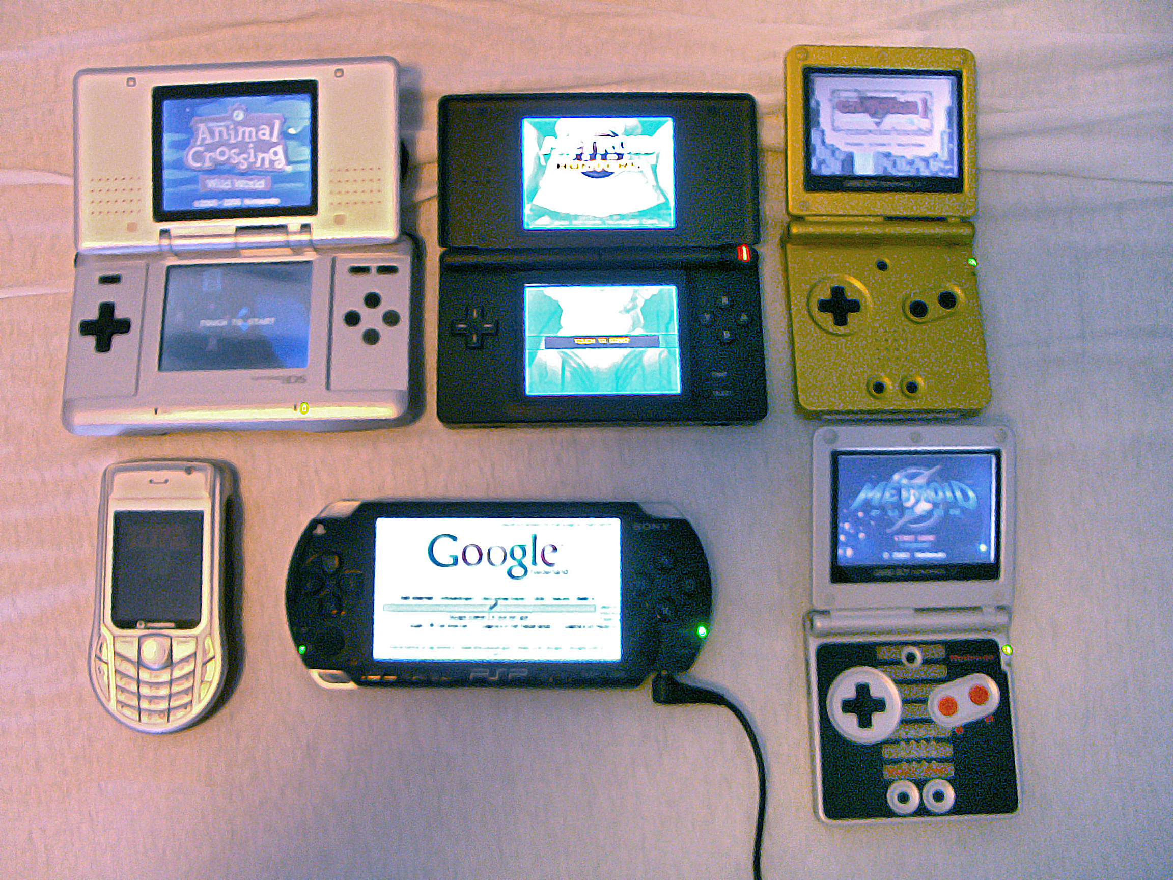 Verschillende handhelds bij elkaar: Game Boy Advance SP (2x), Nintendo DS, Nintendo DS Lite, Sony PSP en Nokia 6630 Smart Phone. Foto zelf gemaakt.